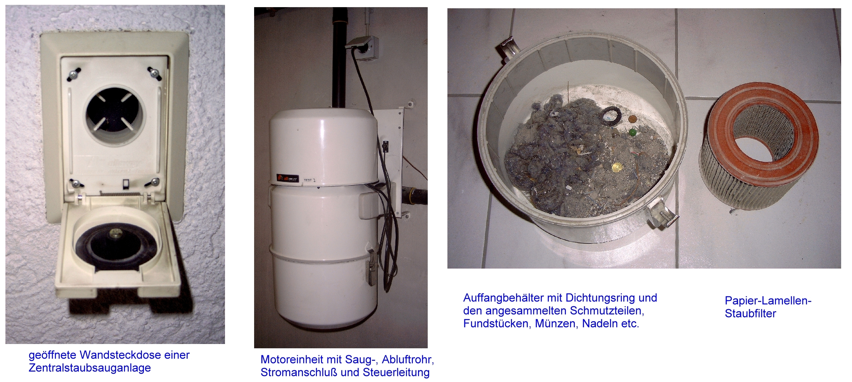 Zentrale Staubsaug Anlage